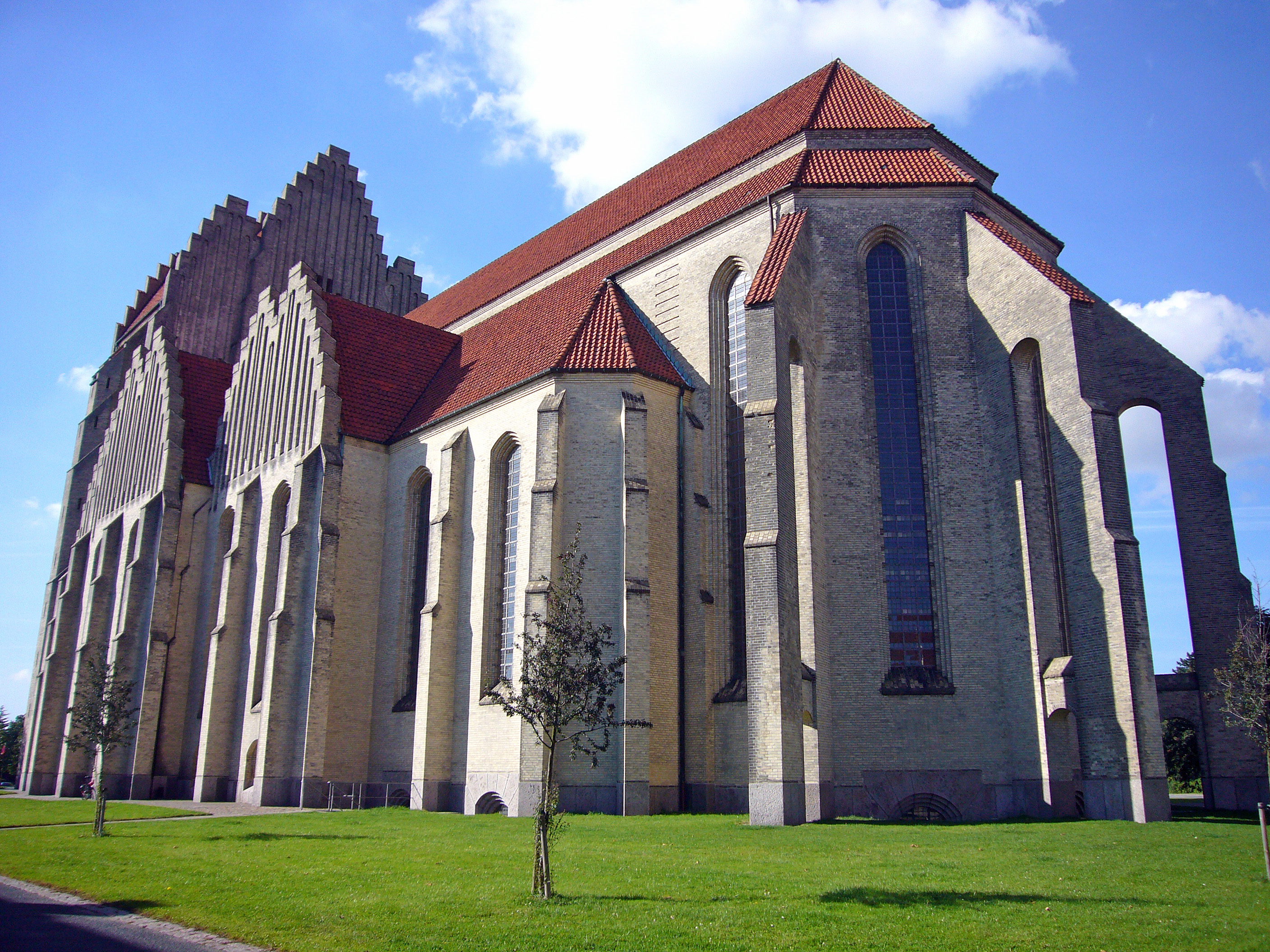 Grundtvigs Kirke, Copenhagen, Denmark. Grundtvigs Kirke